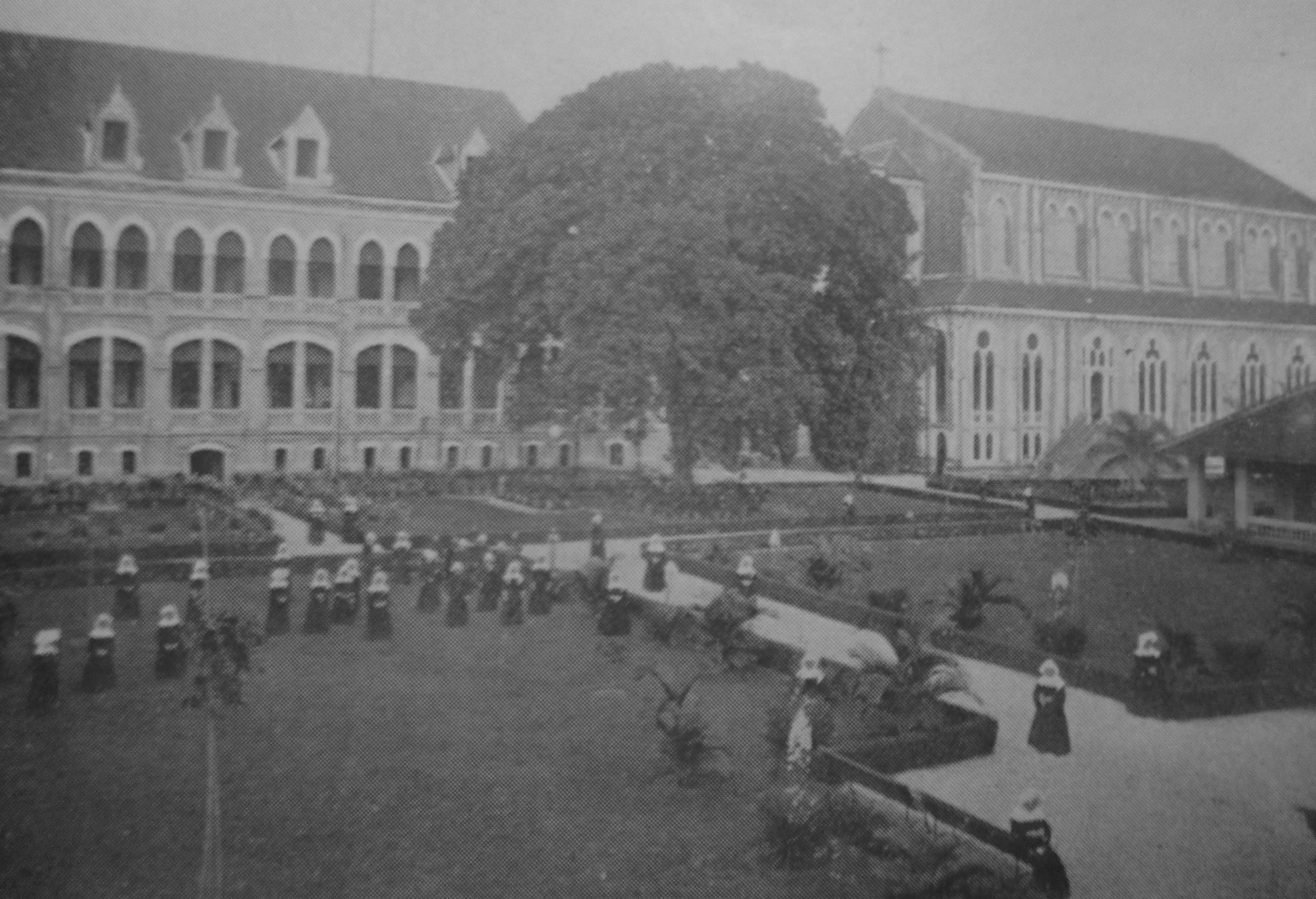 Couvent de la Sainte-Enfance des Sœurs de Saint-Paul de Chartres à Saïgon (Cochinchine) au début du XXe siècle, in chanoine Jean Vaudon, lauréat de l'Académie française, Les Filles de Saint-Paul en Indo-Chine, éd. procure des Sœurs de Saint-Paul de Chartres, Chartres, 1931, p. 311